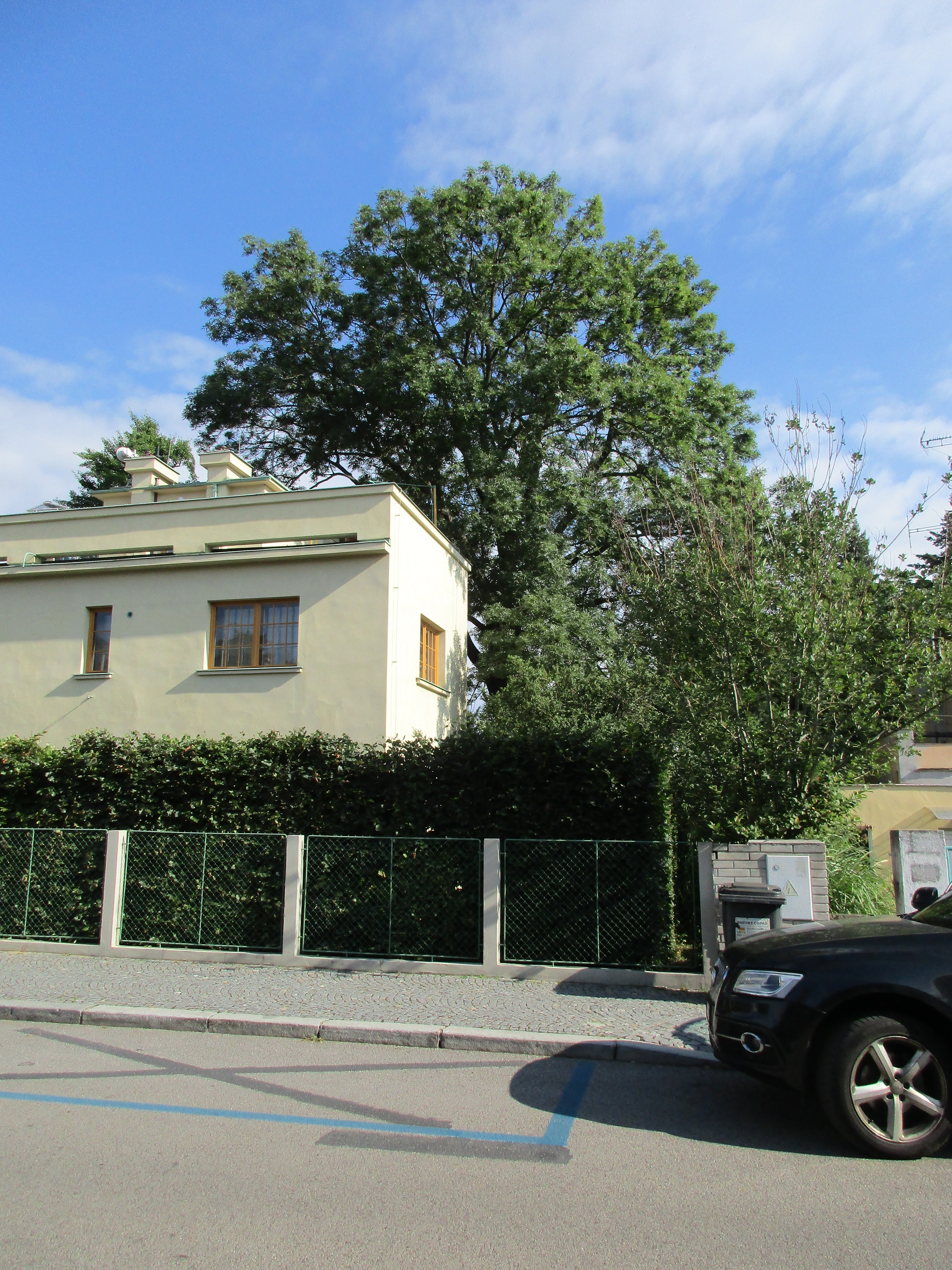 Jasan ztepilý (Fraxinus excelsior). Praha 6 - Břevnov, U páté baterie 896/50.